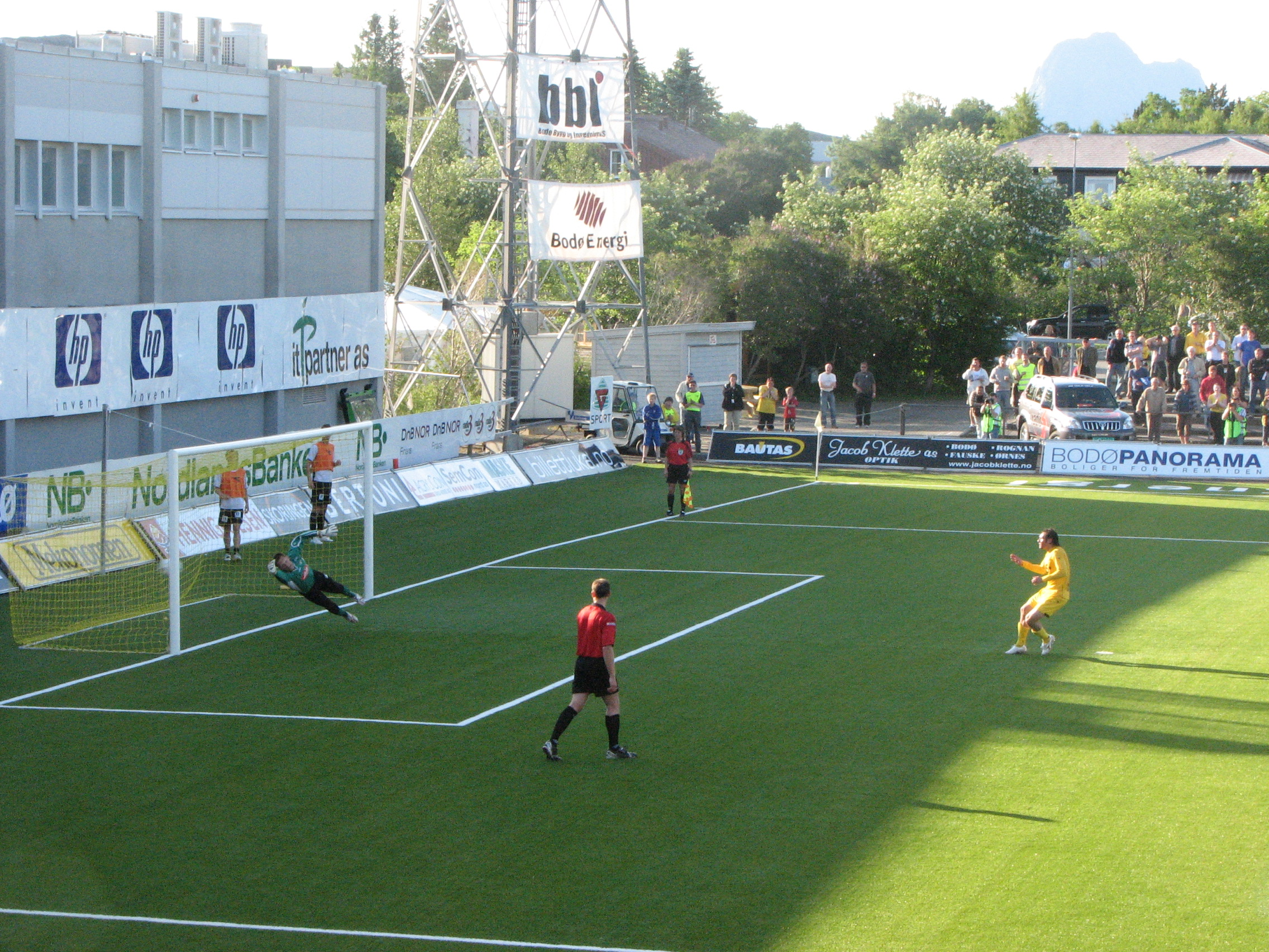 Thiago Martins skårer for B/G på straffe mot Sogndal 2-0